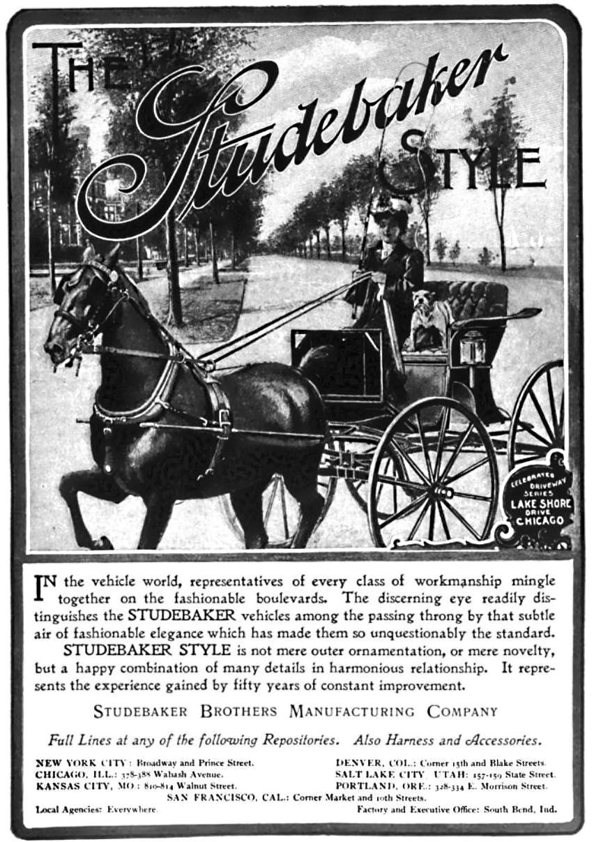 1902 Studebaker advertisement